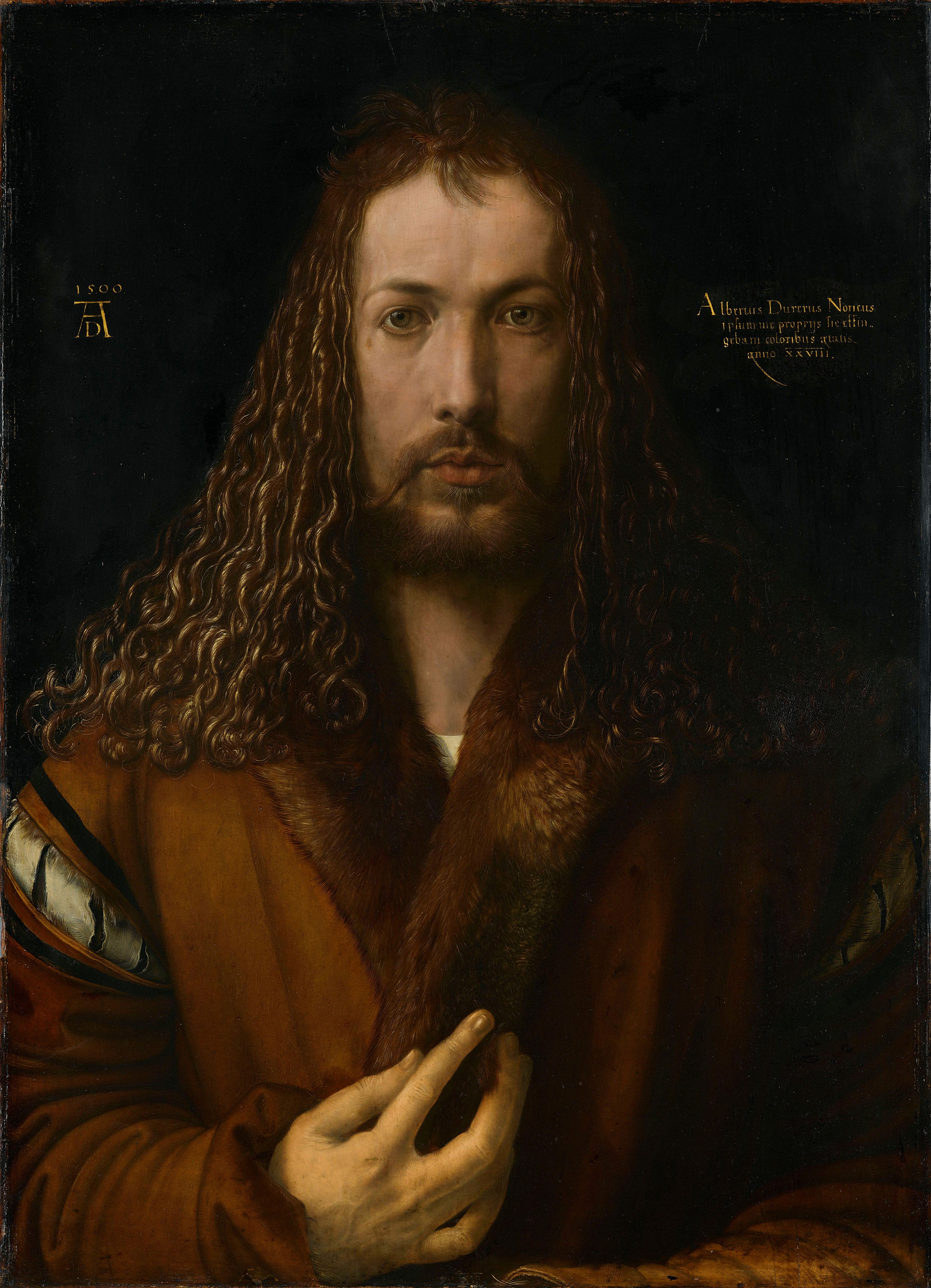 Frontalporträt mit Idealisierung vergleichbar mit Christusdarstellungen; betonter Blick und die schöpferische Hand als Werkzeuge des Künstlers